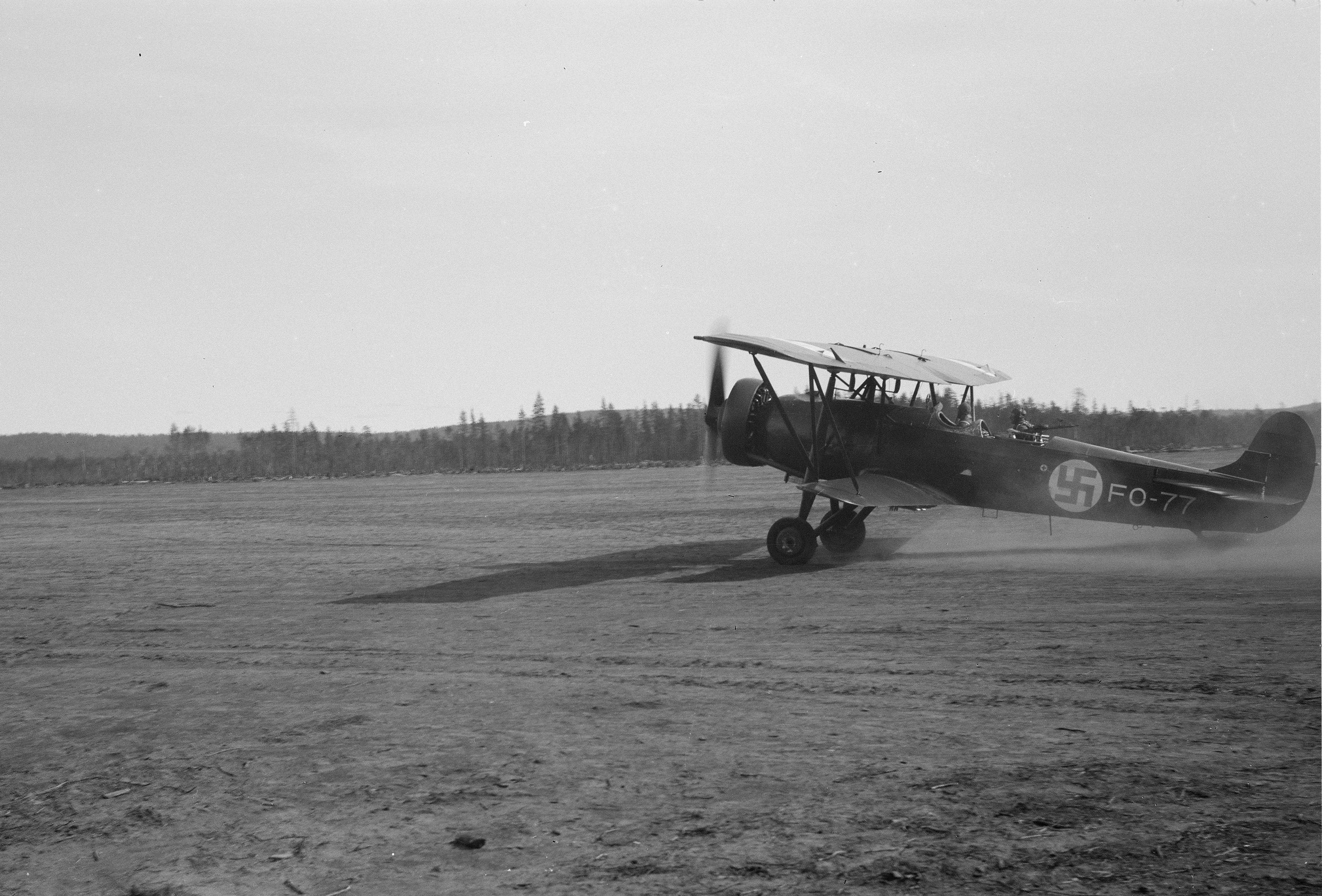 Lentotukikohdasta. (Kuvassa on Fokker C.VE tiedustelukone). Kuvauspaikka: Tiiksjärven lentokenttä